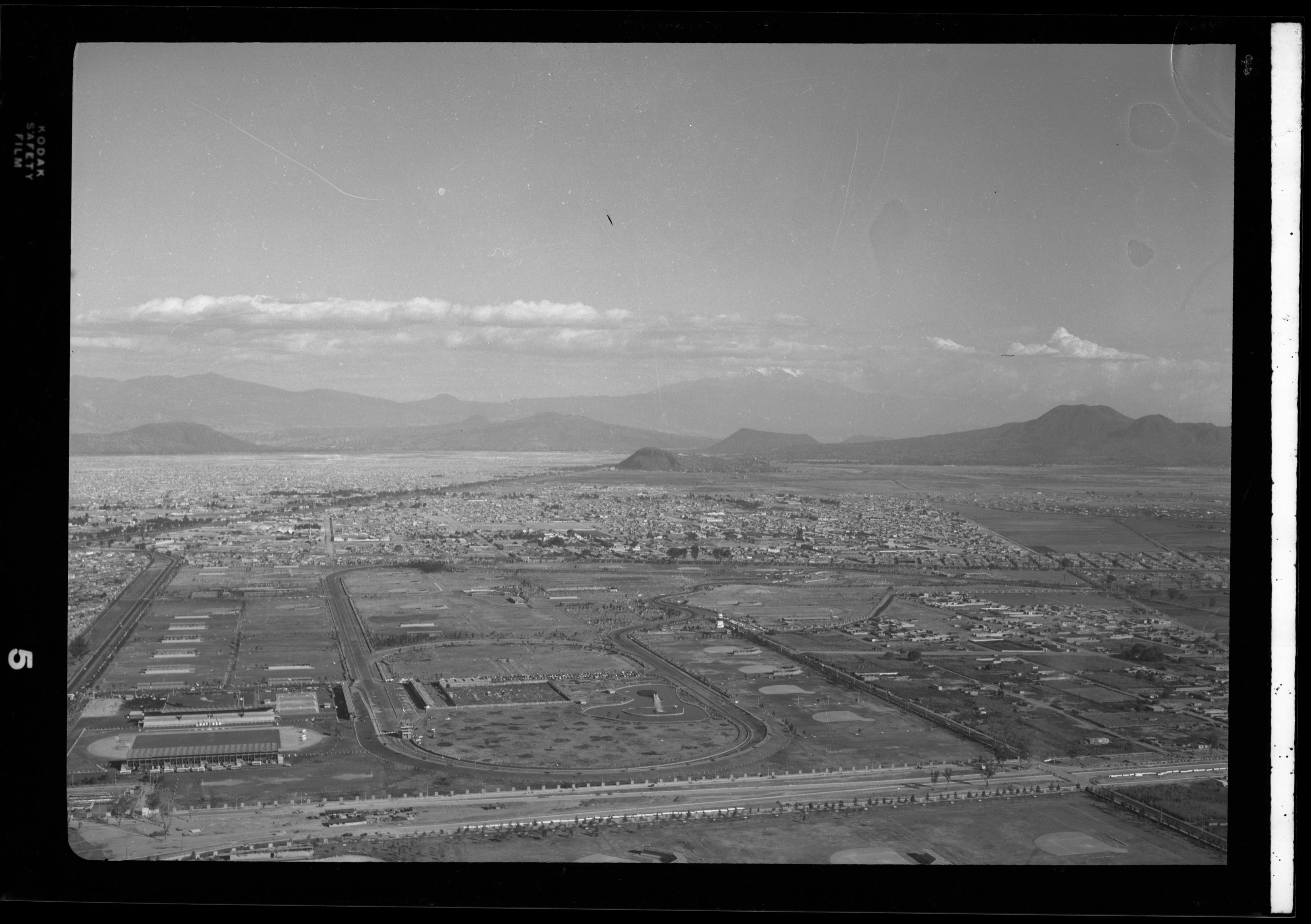 Vista áerea del poniente de la ciudad de méxico. en primer plano se aprecia la construcción de las instalaciones deportivas de la magdalena mixhuca, el autódromo hermanos rodríguez y el estadio "palillo".: Aerial view of Magdalena Mixhuca and Autódromo Hermanos Rodríguez